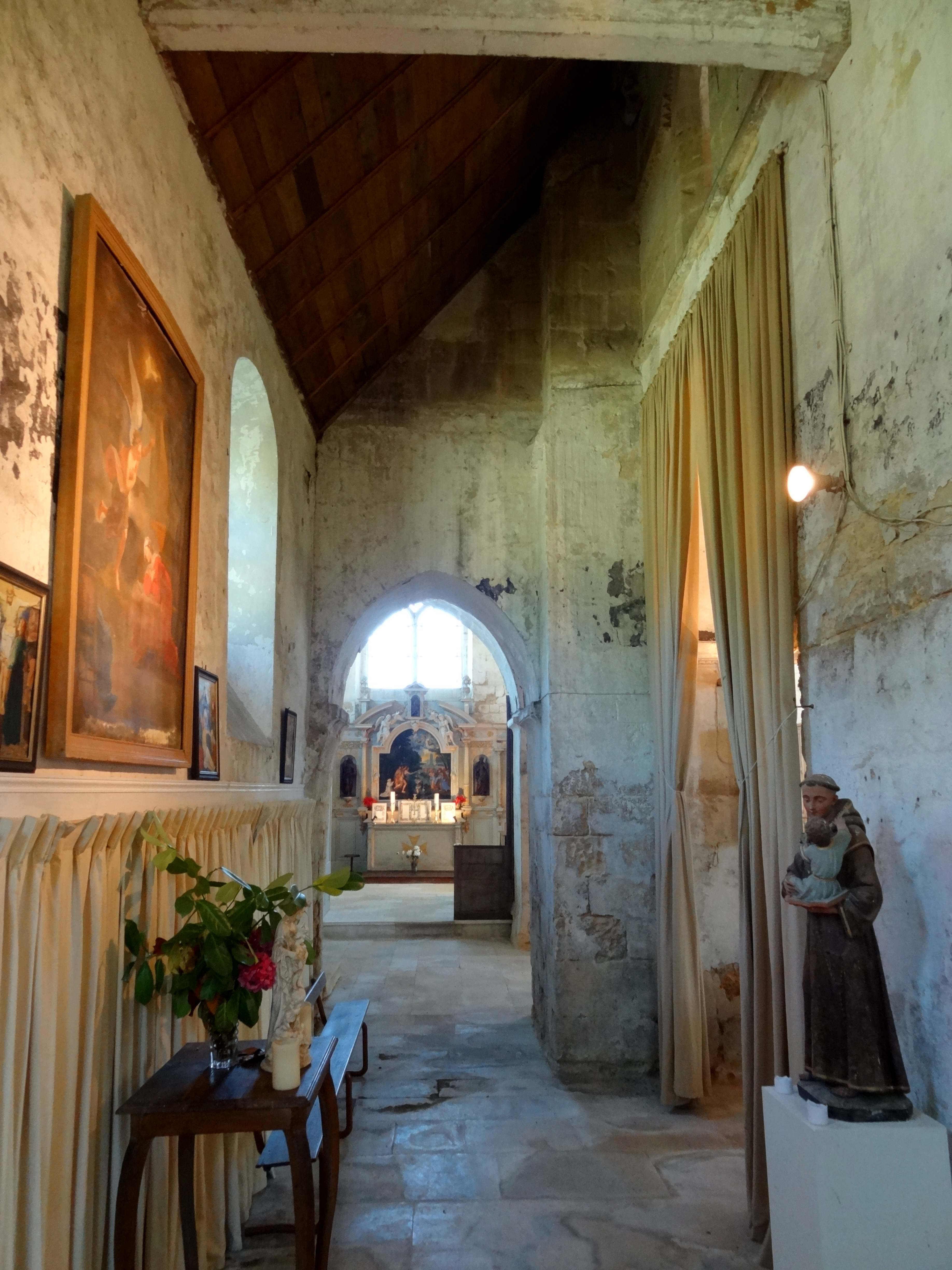 Intérieur de l'église - voir titre.